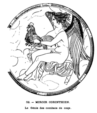 Miroir Corinthien - Le Génie du combat de coq- Extrait du livre Catalogue Sommaire des Musées de la Ville de Lyon page 175